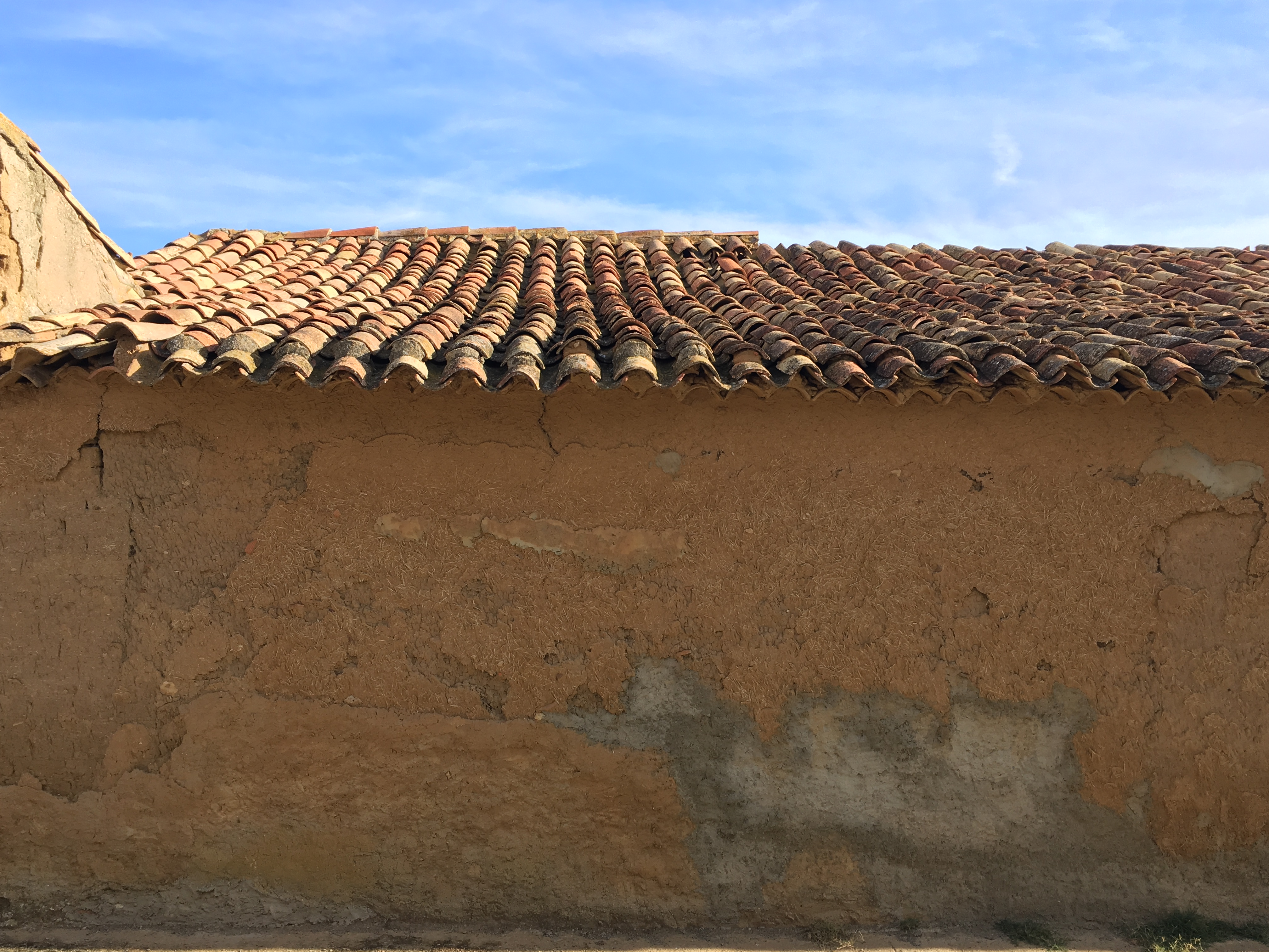 Villaesper Milenario